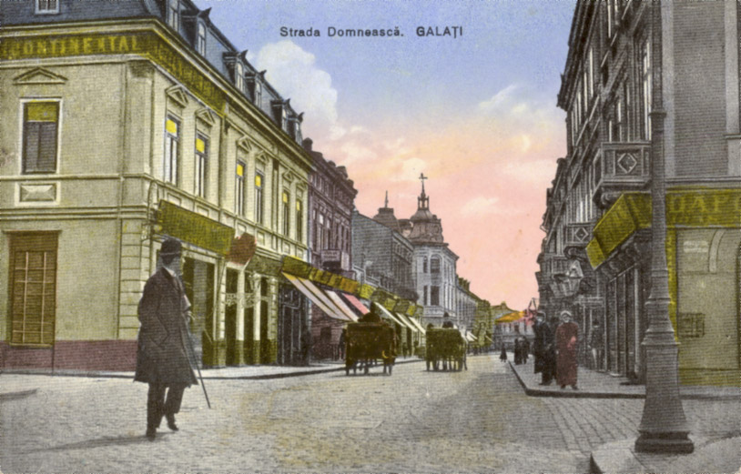 Strada Domneasca din Galati